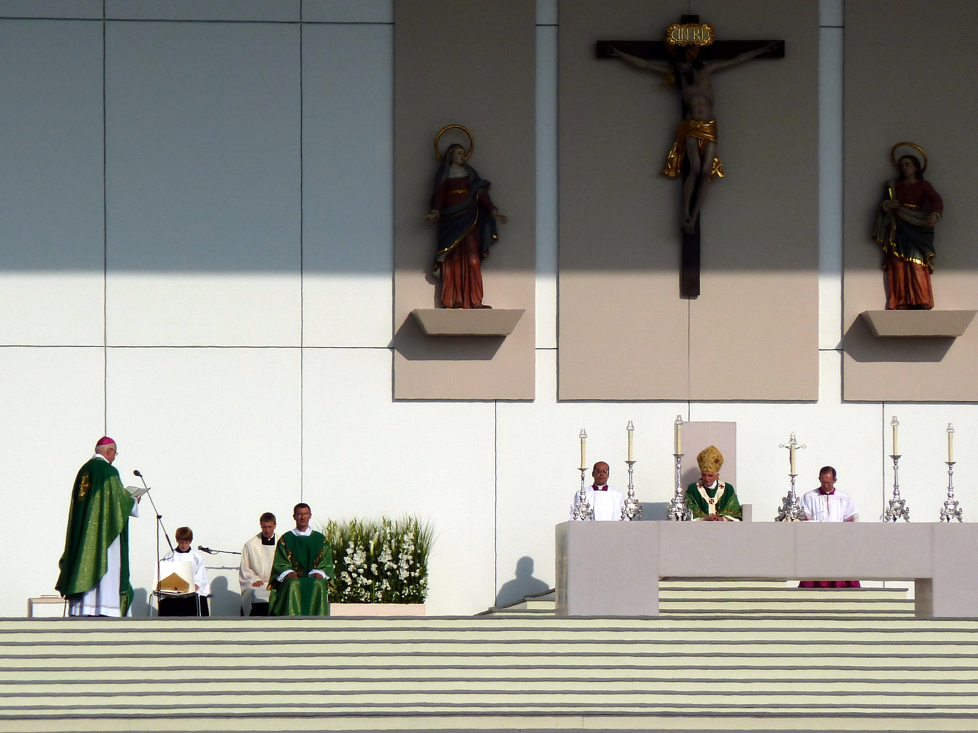 Papst Benedikt XVI. wird vom Freiburger Erzbischof Dr. Robert Zollitsch, Vorsitzenden der Deutschen Bischofskonferenz, begrüsst. Heilige Messe in Freiburg, anlässlich des dritten apostolischen Reise des Papstes in Deutschland.